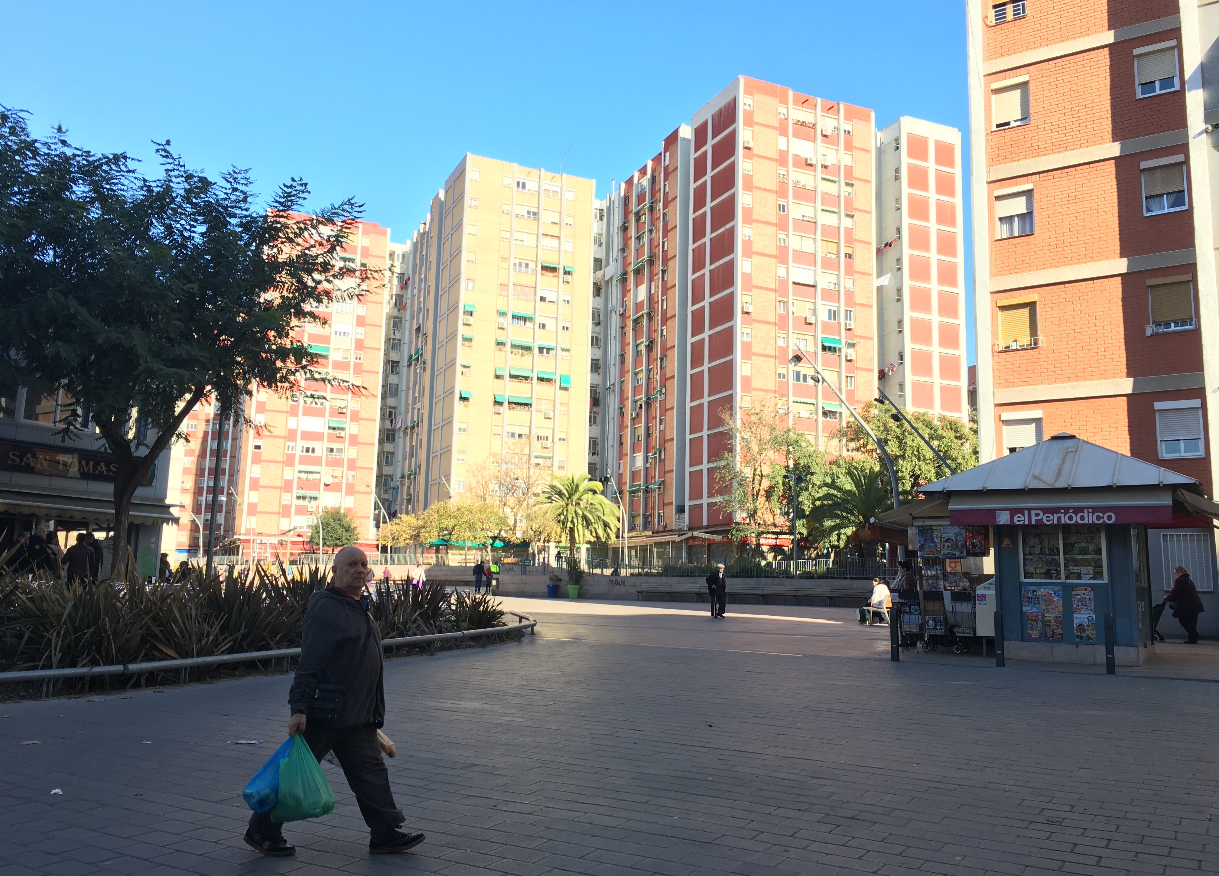 Plaça de la Verge del Pilar (Cornellà de Llobregat, 2016).